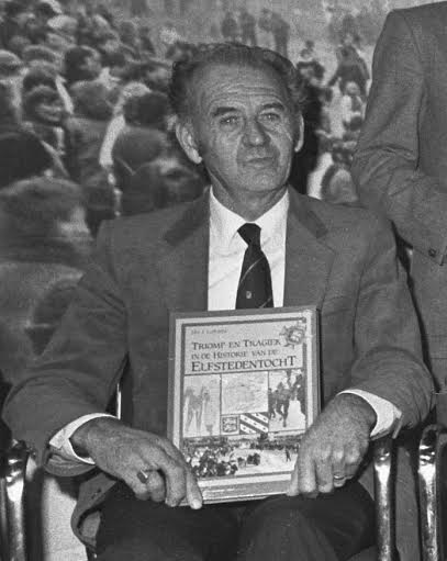 Uitsnede van Jan van den Hoorn. Elfstedentochtwinnaars aanwezig bij presentatie boek over Elfstedentocht in Franeker; vlnr: v.d. Hoorn , Westra, v.d. Duim , Keijzer, Castelijn, 4 november 1986 (originele foto op